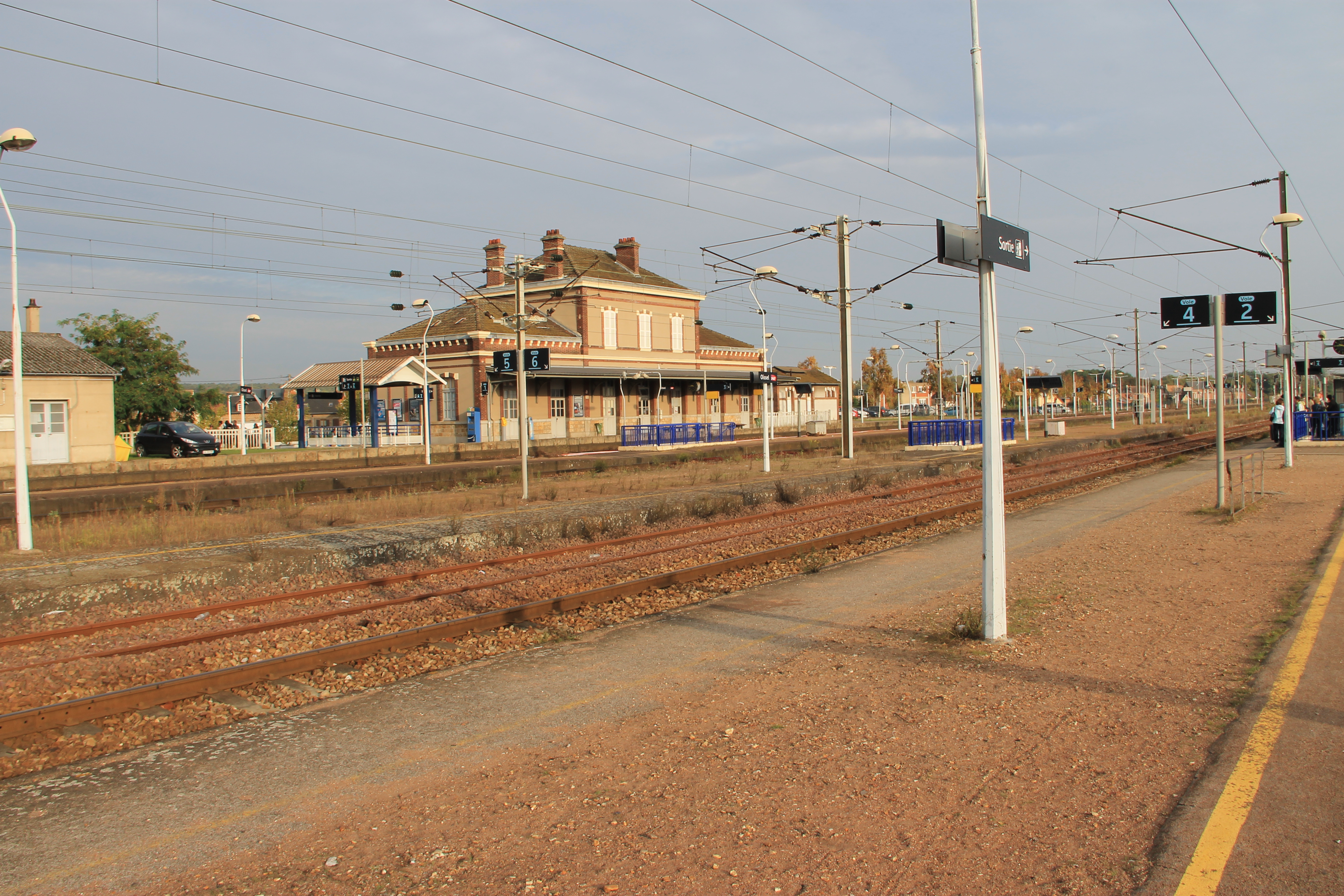 Gare d'Oissel, Seine-Maritime, France.